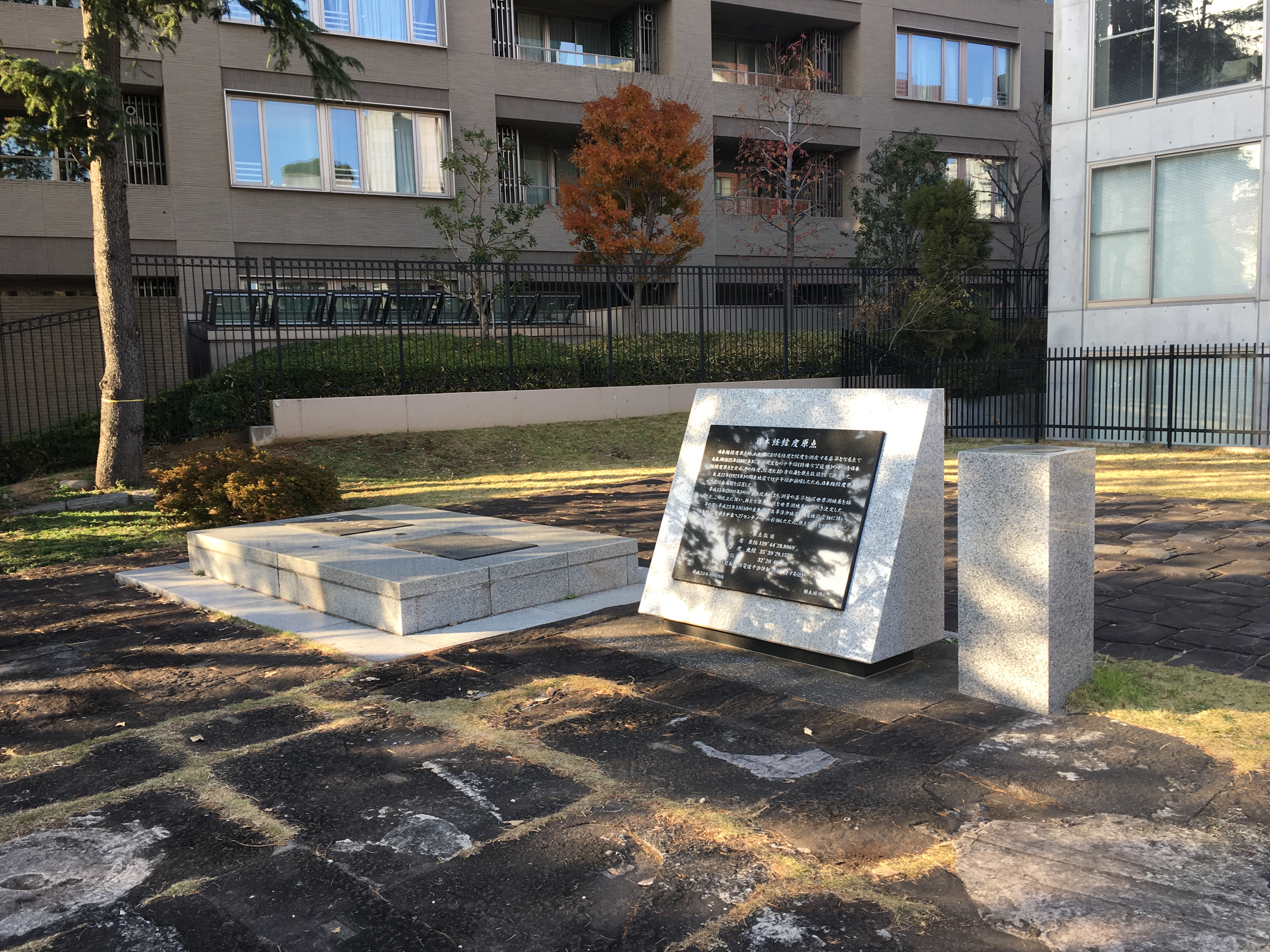 日本経緯度原点（チットマン点）